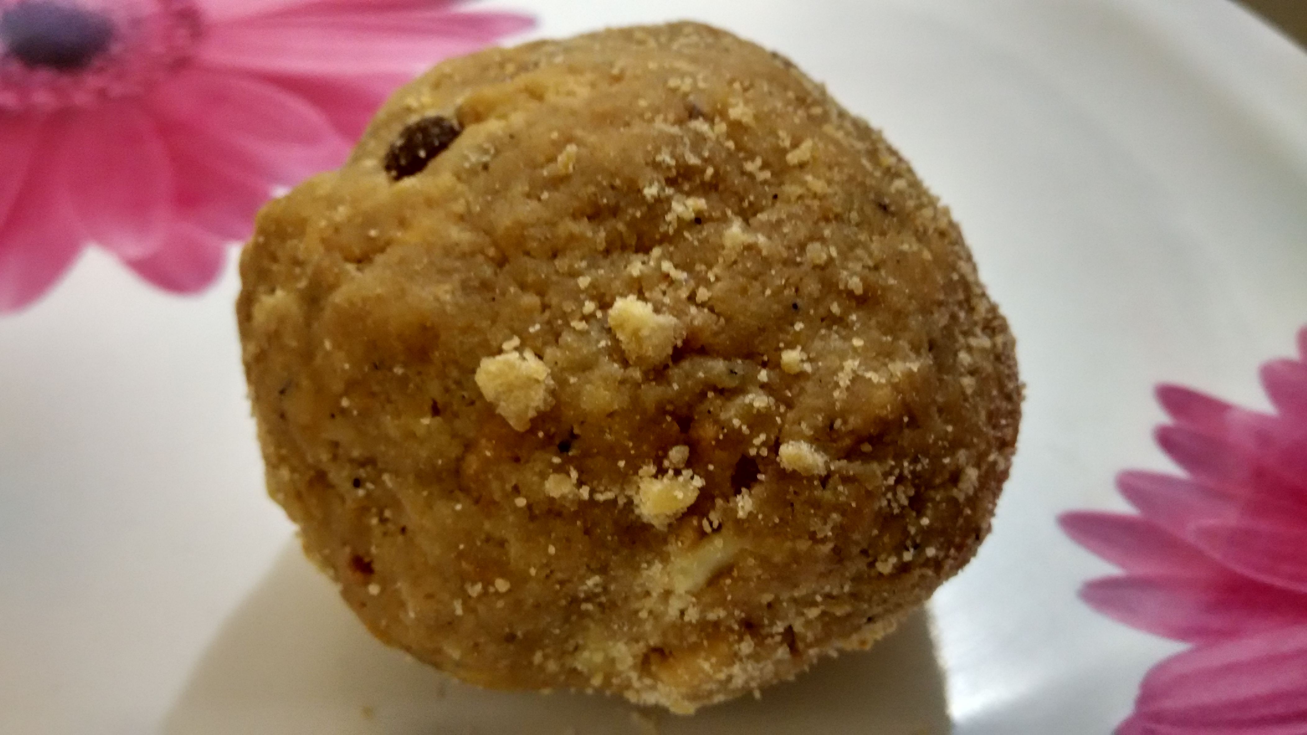 திருமலை இலட்டு.